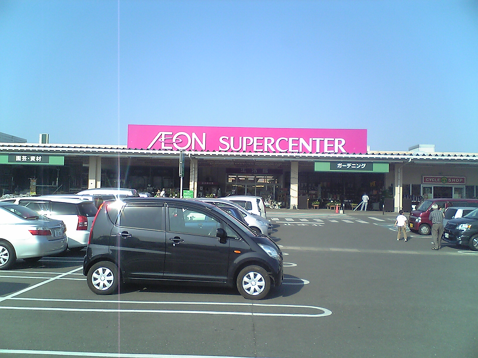 福岡県糸島市志摩津和崎にあるイオンスーパーセンター志摩店